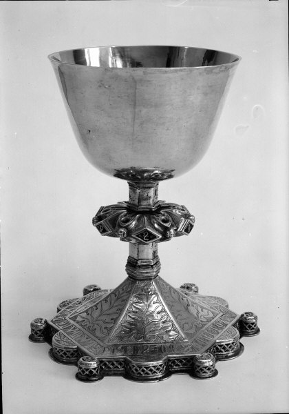 Kalk av silver. från 1300-talet, skålen yngre. Kategori: (06A) GudstjänstutensilierKalk av silver. från 1300-talet, skålen yngre.